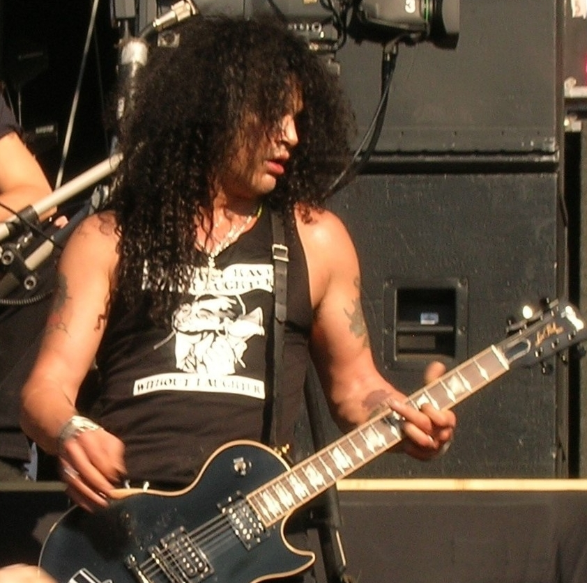 Saul Hudson AKA Slash, Velvet Revolver concert in Nijmegen